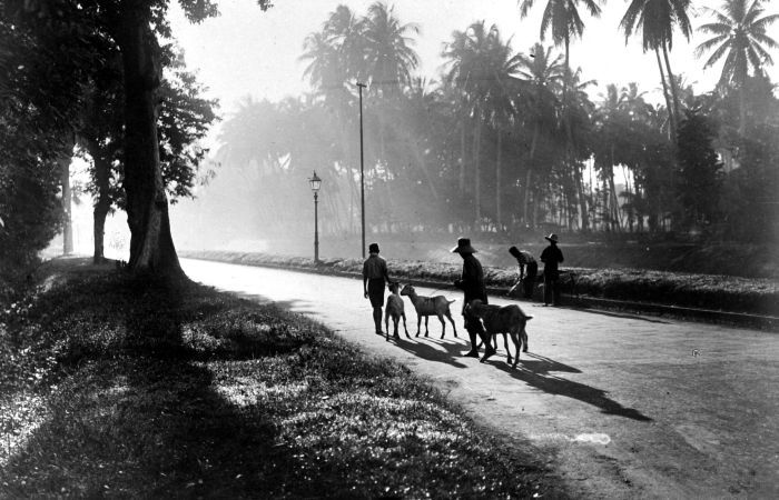 Repronegatief. Hoewel veel minder bezongen dan de karbouw was de geit aan het begin van de 20e eeuw in feite belangrijker voor de bevolking van Java, maar niet zo belangrijk als het rund. In 1920 waren er per 1.000 Javanen 61 karbouwen, 85 geiten en 107 runderen (en ook nog 21 schapen). In de loop der tijd zijn ze steeds belangrijker geworden. Wie nu ergens op Java sateh eet heeft een goede kans dat het sateh kambing is, sateh van geit dus. Doorgaans onderscheidde men op Java, naast de Javaanse, ook Bengaalse geiten en geiten van het Kashmir- en Angoraras, meegebracht door de op Java wonende Arabieren. (P. Boomgaard, 2001). Geitenhoeders op de Oud-Jacatraweg te Batavia